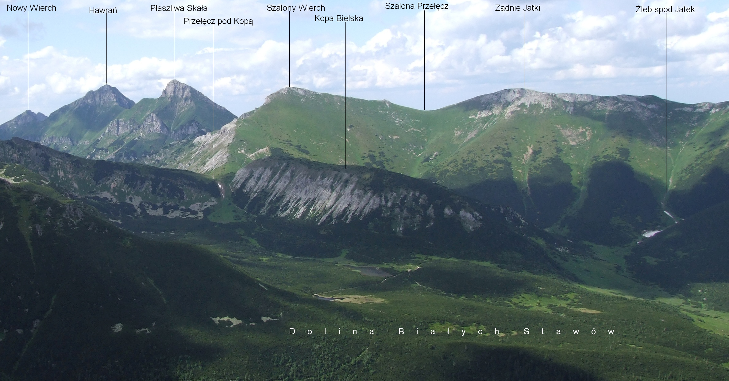 Tatry Bielskie. Widok z Przechodu za Rakuską Czubą